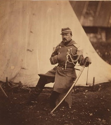 Pierre Bosquet (1810-1861), French soldier